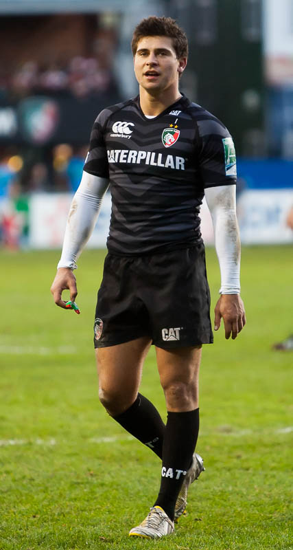 Ben Youngs. Leicester Tigers vs Benetton Treviso in a Heineken Cup Pool Game at Welford Road, Leicester, England